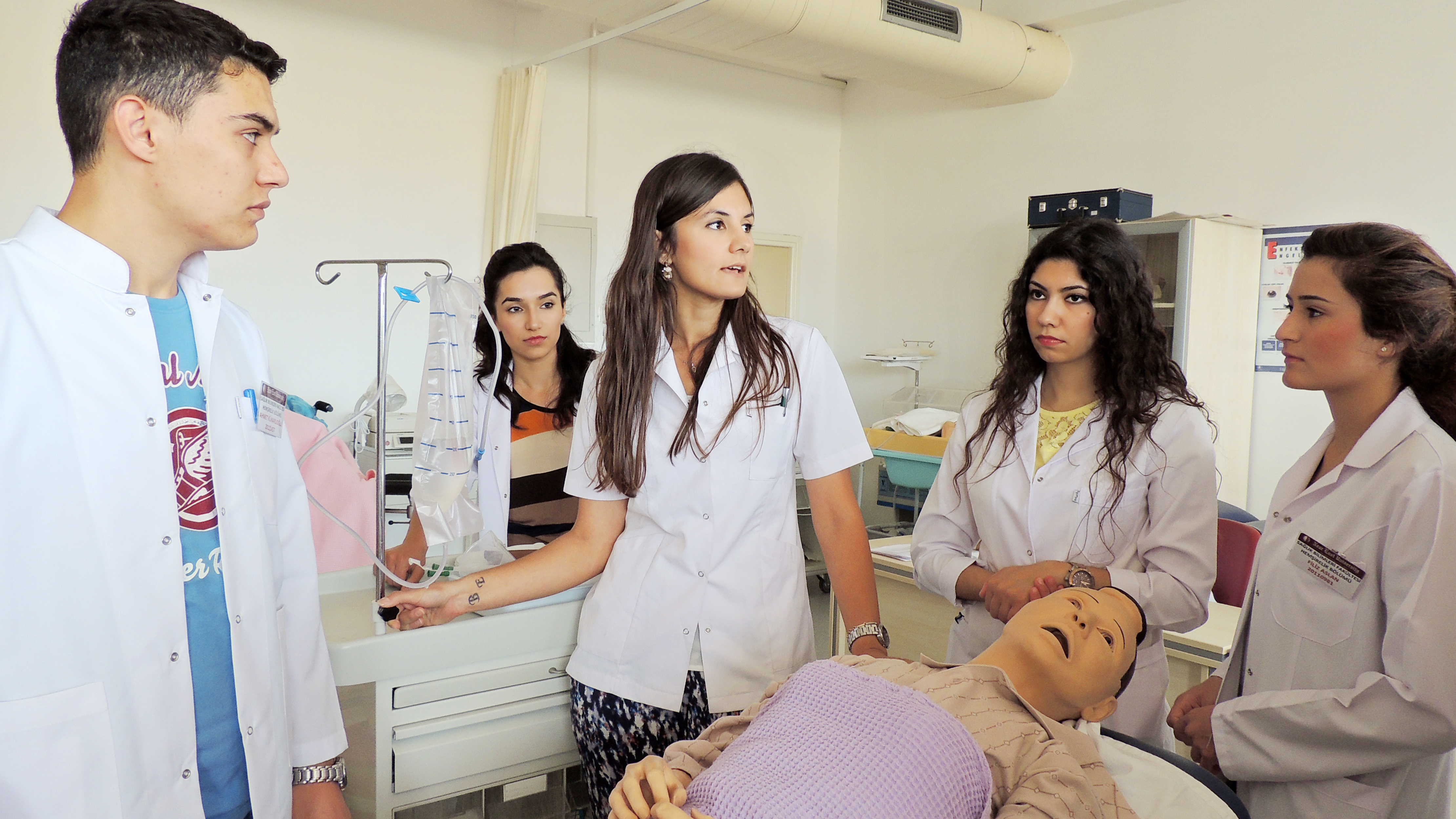 Yakın Doğu Üniversitesi Sağlık Bilimleri Fakültesi Hemşirelik labı.